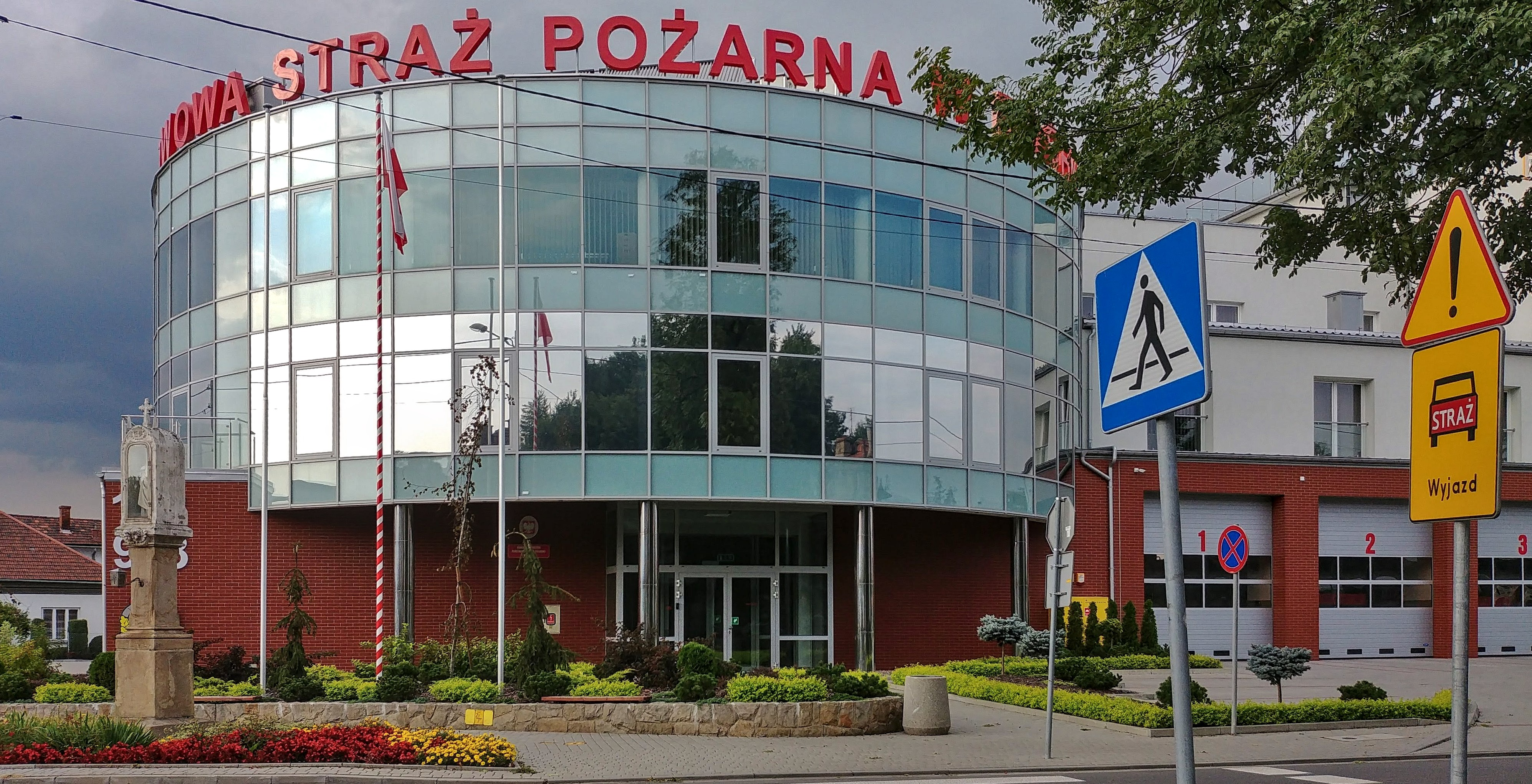 Budynek PSP w Bochni.